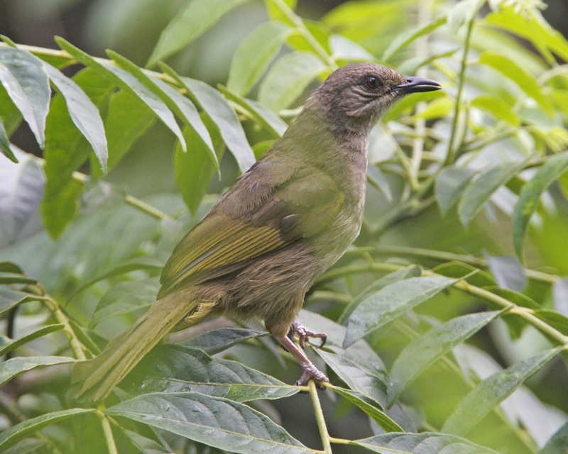 owb Pycnonotus plumosus 690V6039.jpg